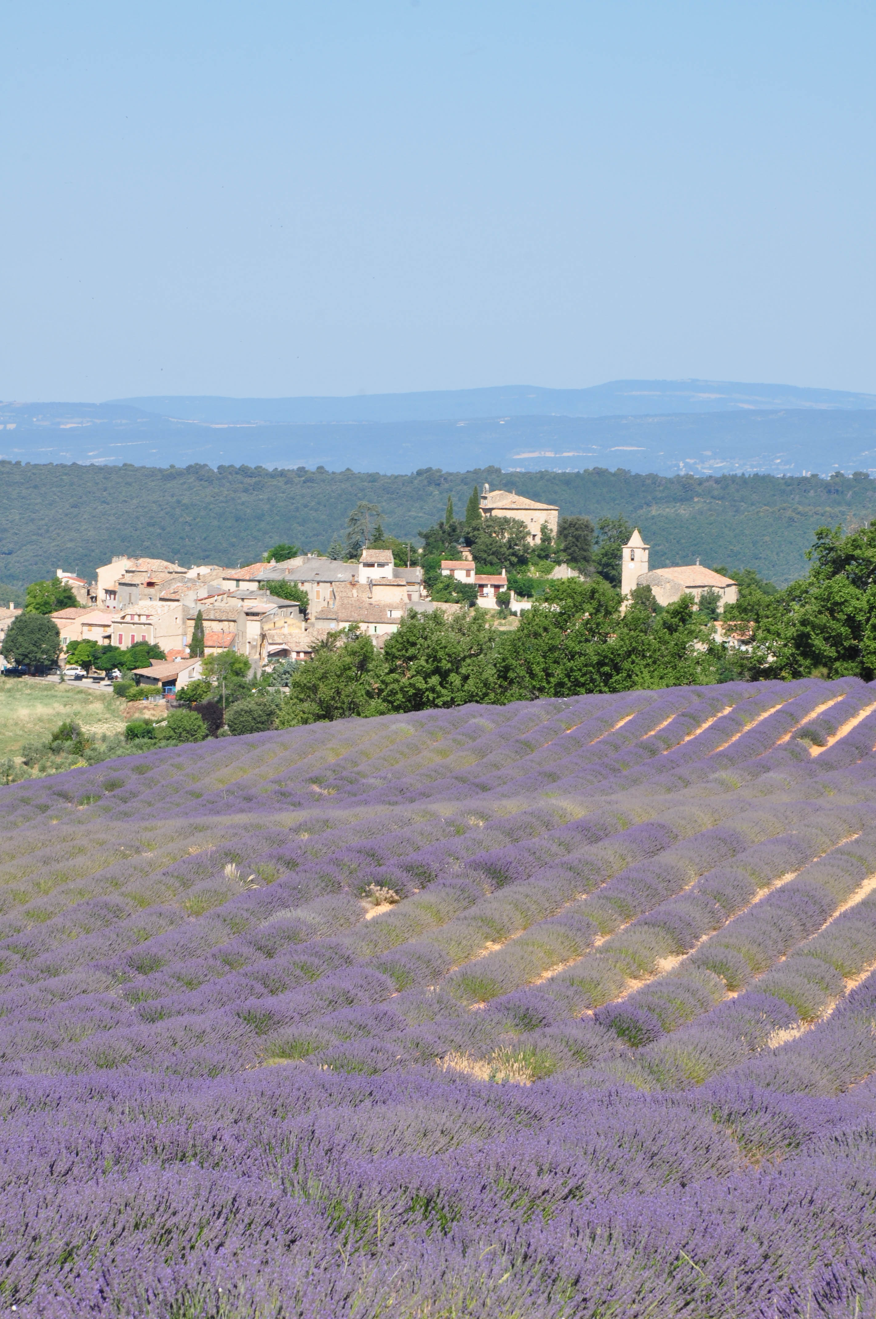 Entrevennes, le village et ses lavandes